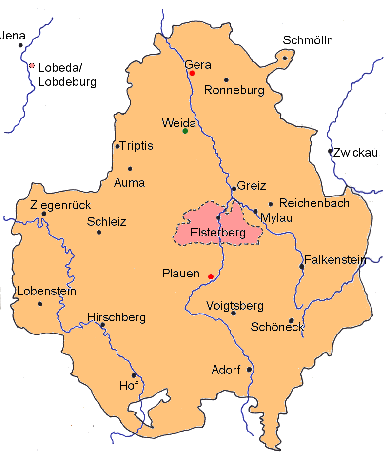 Herrschaftsgebiet der Vögte von Weida, Gera und Plauen um 1350